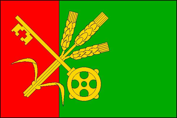 Vlajka obce Blažejovice